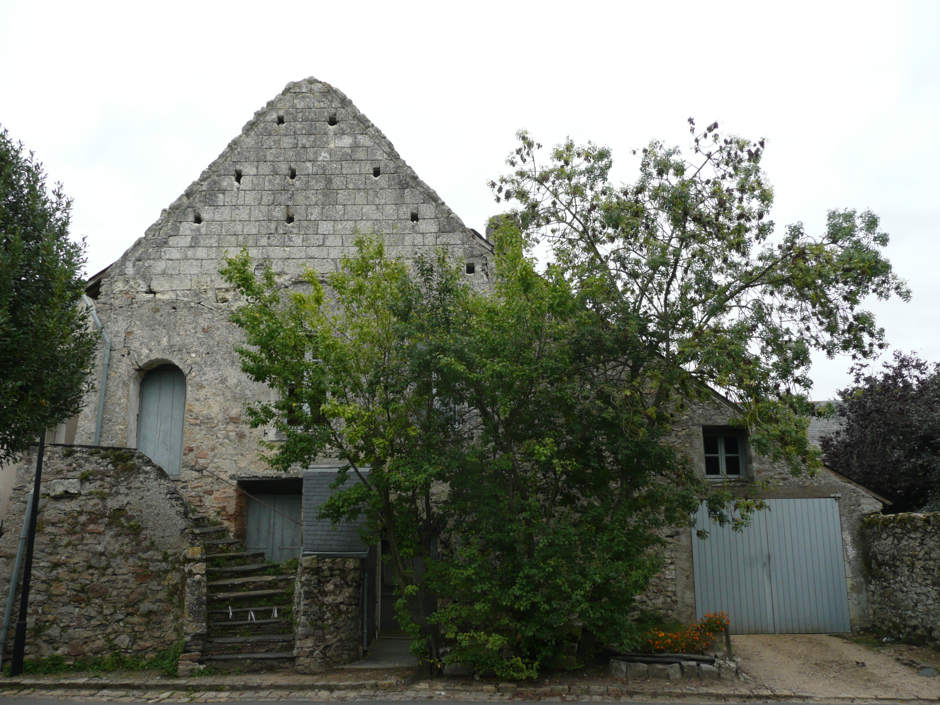 Briollay - Ancienne salle seigneuriale .